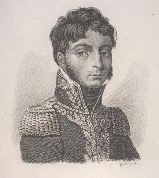 Ségur, Philippe-Paul (1780-1873), général of Napoleon //PHI/PE. DE SÉGUR, Forestier Sculp. | Ambroise Tardieu Direxit